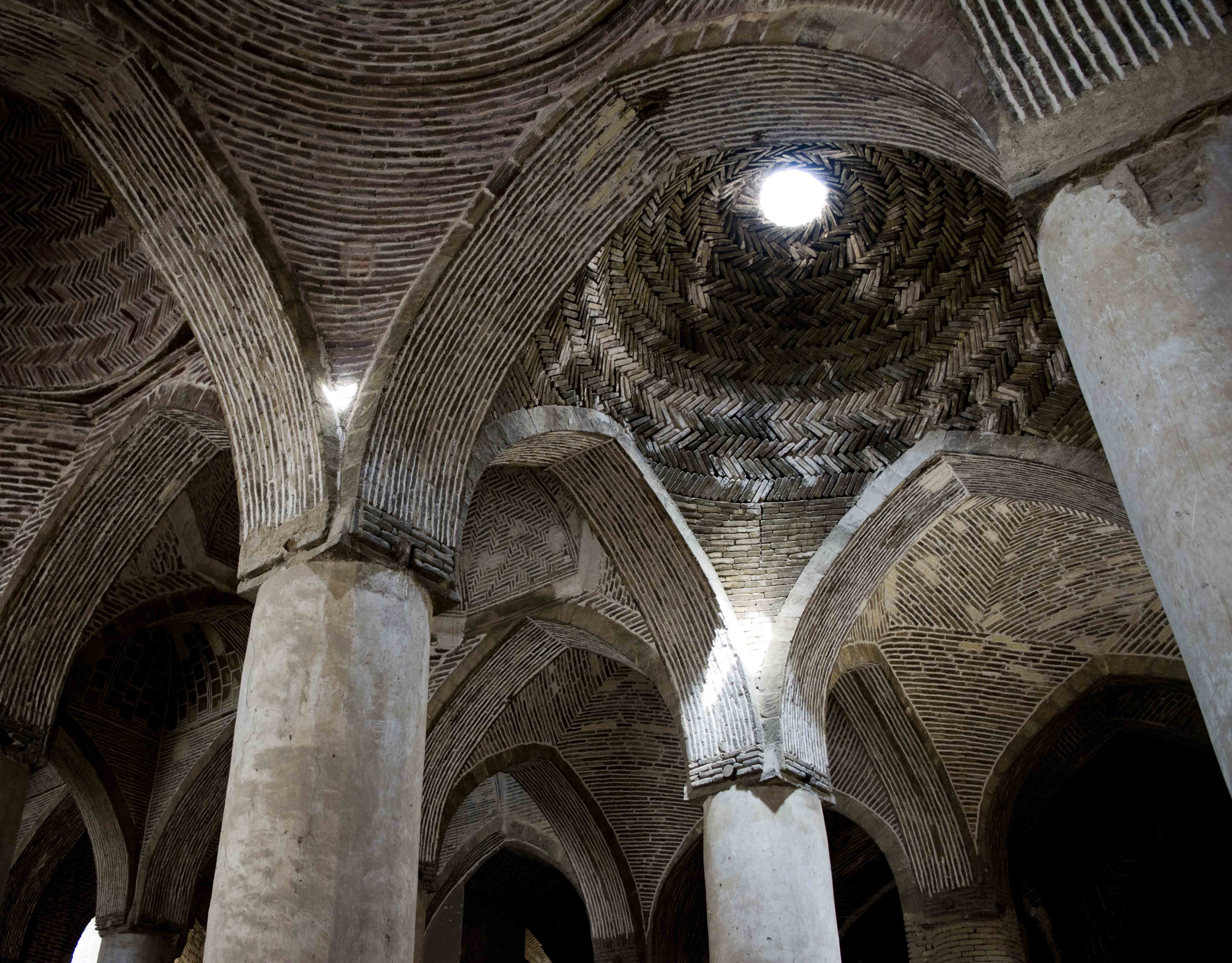 شبستان شمالی مسجد جامع اصفهان